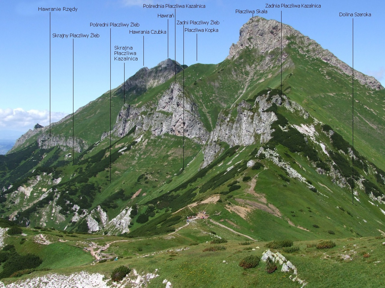 Płaczliwa Skała i Szeroka Przełęcz Bielska w Tatrach Bielskich